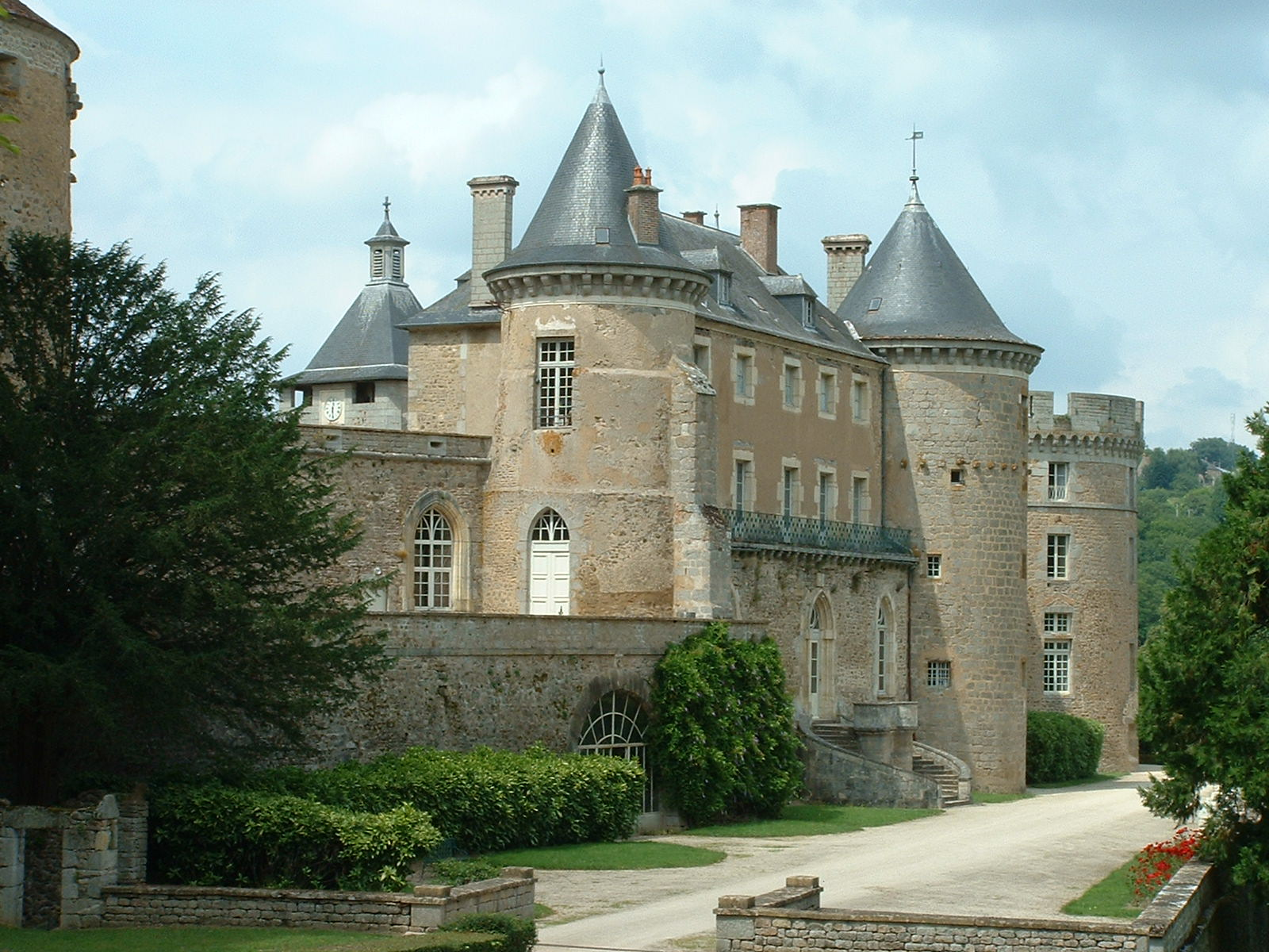 Château de Chastellux, Yonne